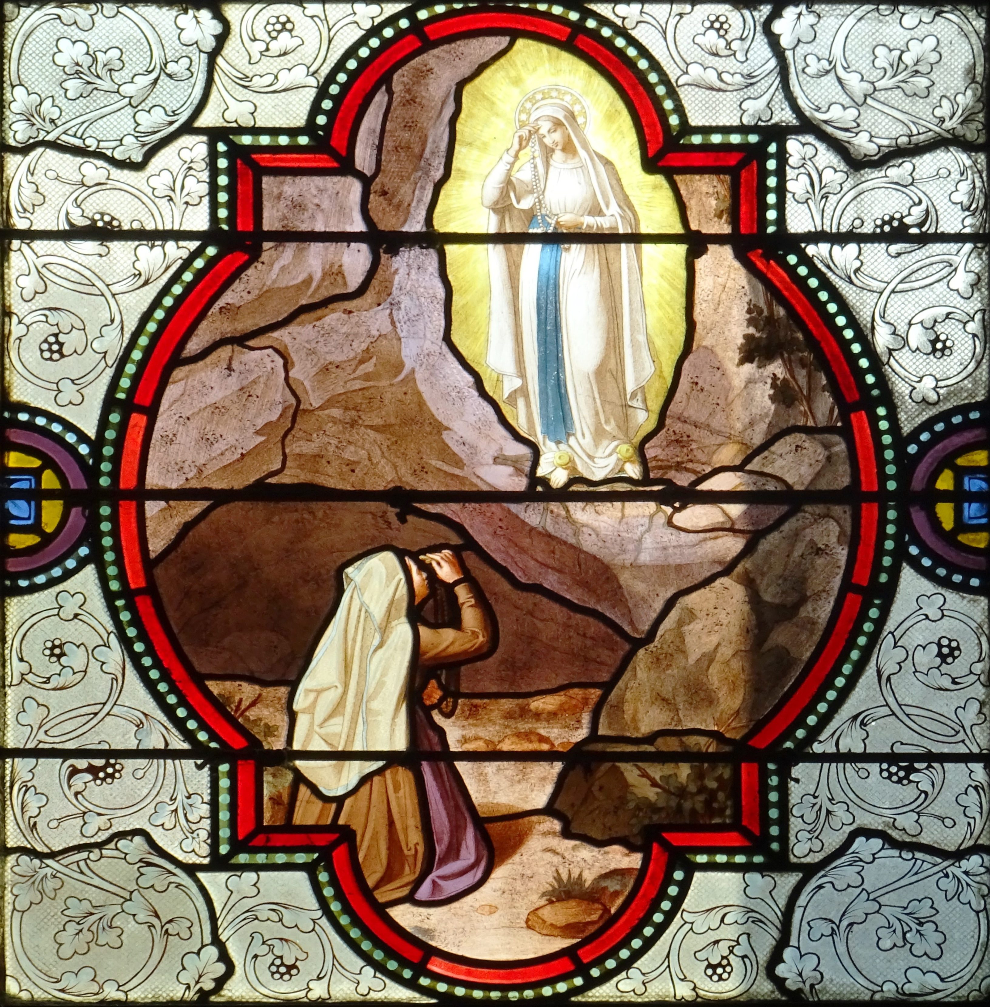 Lourdes - Vitrail de la basilique de l'Immaculée Conception -1ère apparition de la Vierge à Bernadette